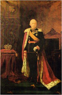 Ferdinand d'Huart: De Groussherzog Adolphe.